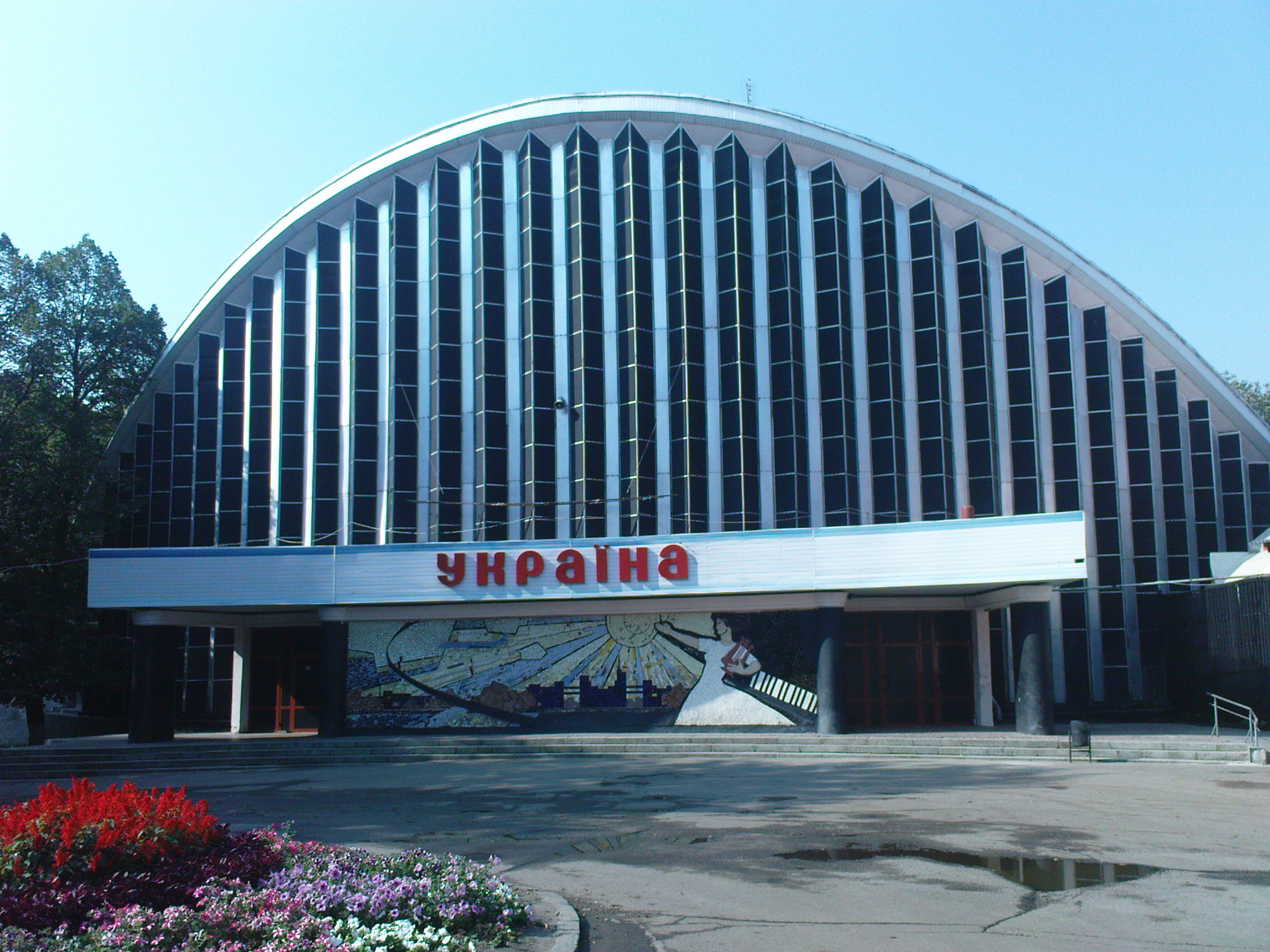 Україна, Харків, вул. Сумська, 35